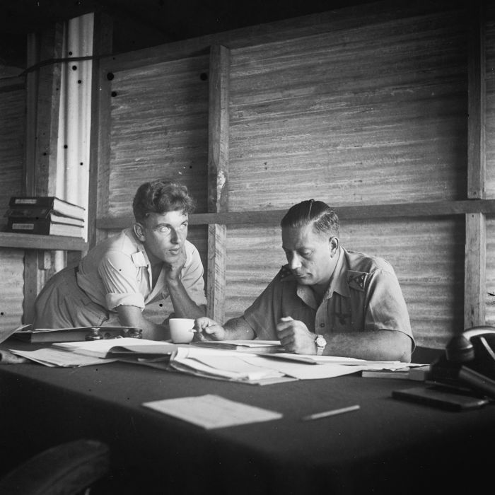 negatief. Nederlandse militaire officier achter schrijftafel